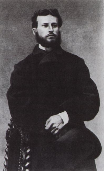 Василий Верещагин во время первой поездки на Кавказ